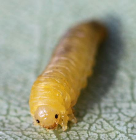 Larve der Kirschblattwespe (Caliroa cerasi) am 10.9.2017 in der Schwetzinger Hardt